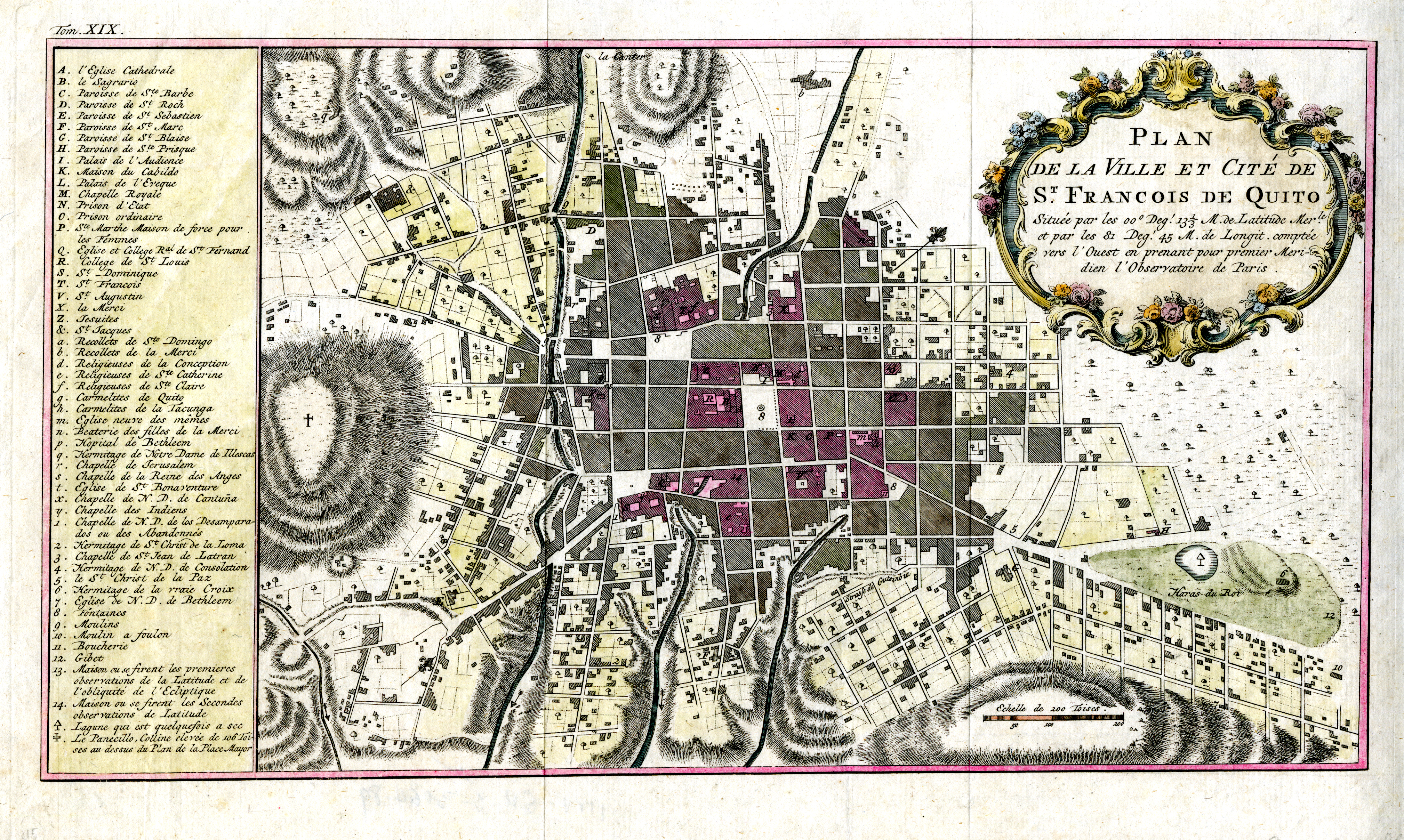 De Ulloa, Antonio y Jorge Juan. Relación Histórica del Viaje a la América Meridional, hecho de Orden de Su Majestad Católica para medir algunos Grados de Meridiano Terrestre, y venir por ellos en conocimiento de la verdadera Figura y Magnitud de la Tierra, con otras varias Observaciones Astronómicas y Físicas. Por Don Jorge Juan Comendador de Aliaga, en la Orden de San Juan, Socio correspondiente de la Real Academia de las Ciencias de París; y Don Antonio de Ulloa de la Real Sociedad de Londres: ambos por Capitanes de Fragata de la Real Armada. Primera Parte / Tomo I. Impresa por la Orden del Rey Nuestro Señor en Madrid por Antonio Marín, Año de MCDDXLVIII (1748). Diapositiva de Consulta y acceso publico cuya información fue investigada de un libro y/o ejemplar de revisión custodiado en los Fondos Bibliográficos (Sección Siglo XVIII o Etapa Colonial) del Archivo Histórico del Guayas; Guayaquil, Ecuador.Consultado y compartido por el usuario Jodison Javier García Alcivar.